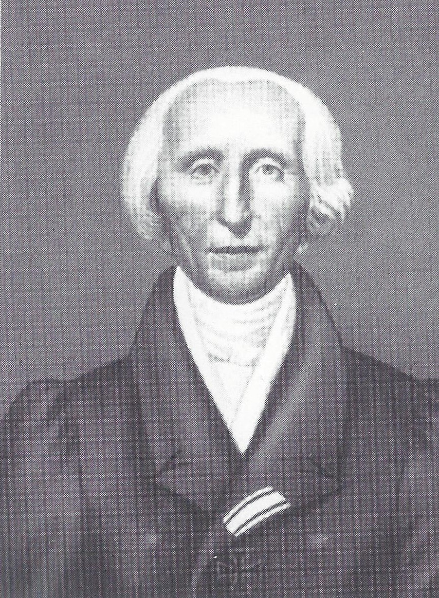 Schwarz-weiß-Fotografie eines Gemäldes von Johann Gottfried Frey